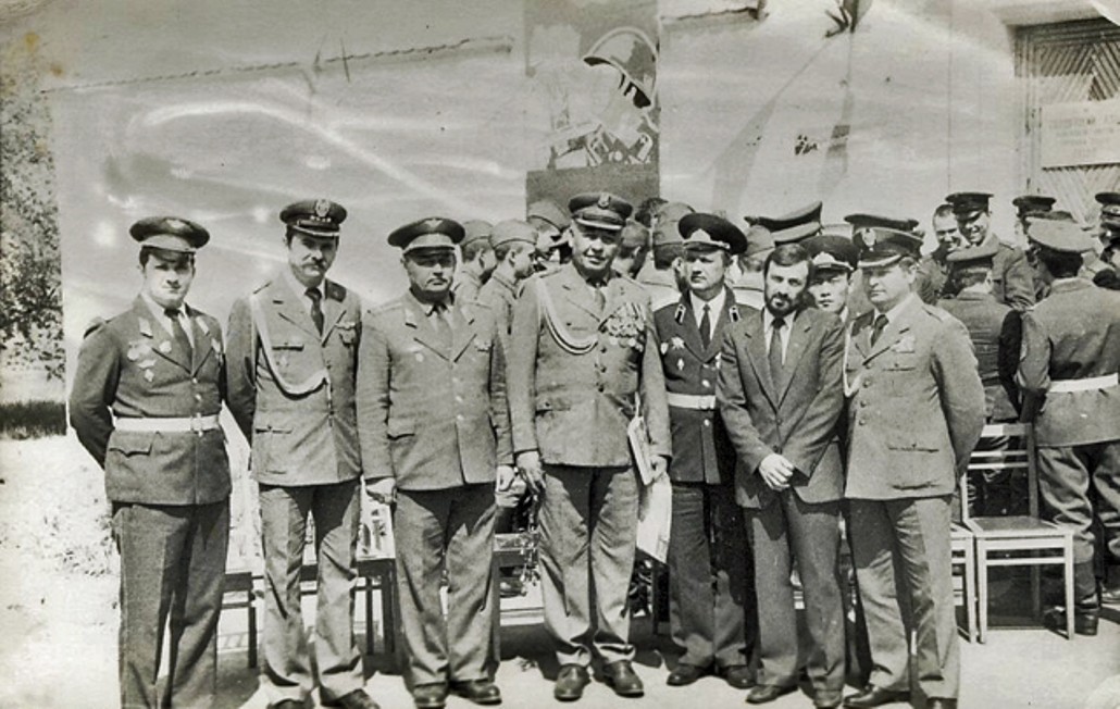 Wizyta dowódcy 38 dr OP w Kluczewie, 1984.